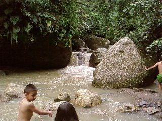 Rivière sur le territoire de la municipalité d'Acacias en Colombie, dans le département de Meta